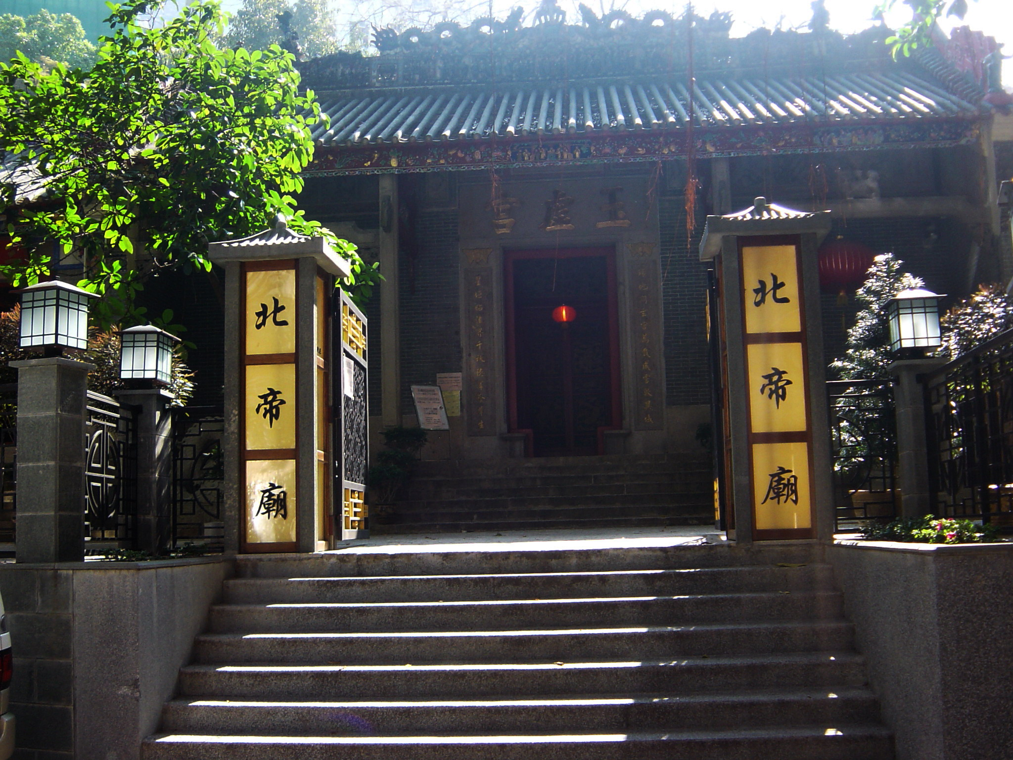 香港灣仔玉虛宮。Wan Chai Pak Tai Temple, Hong Kong.